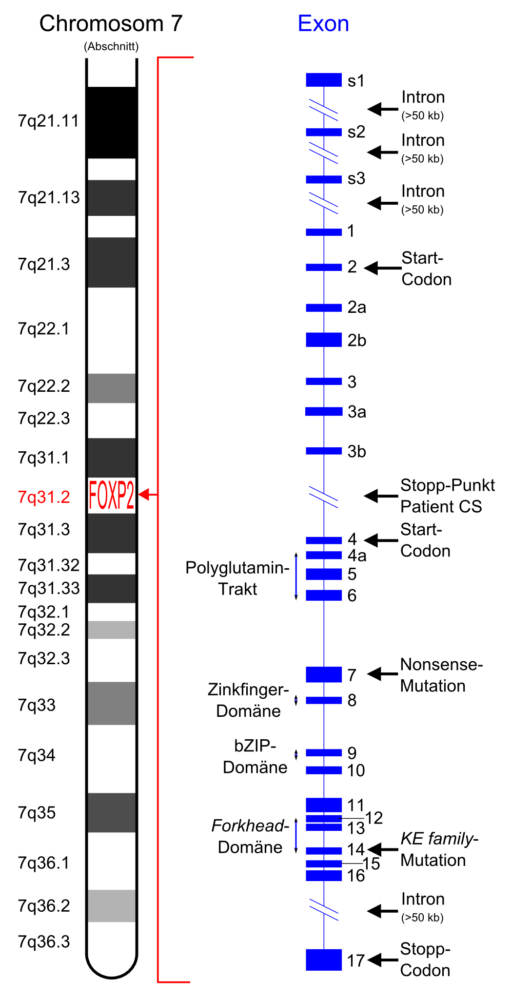 Die Position des FOXP2-Gens auf Chromosom 7. Die 17 Exons des Gens.